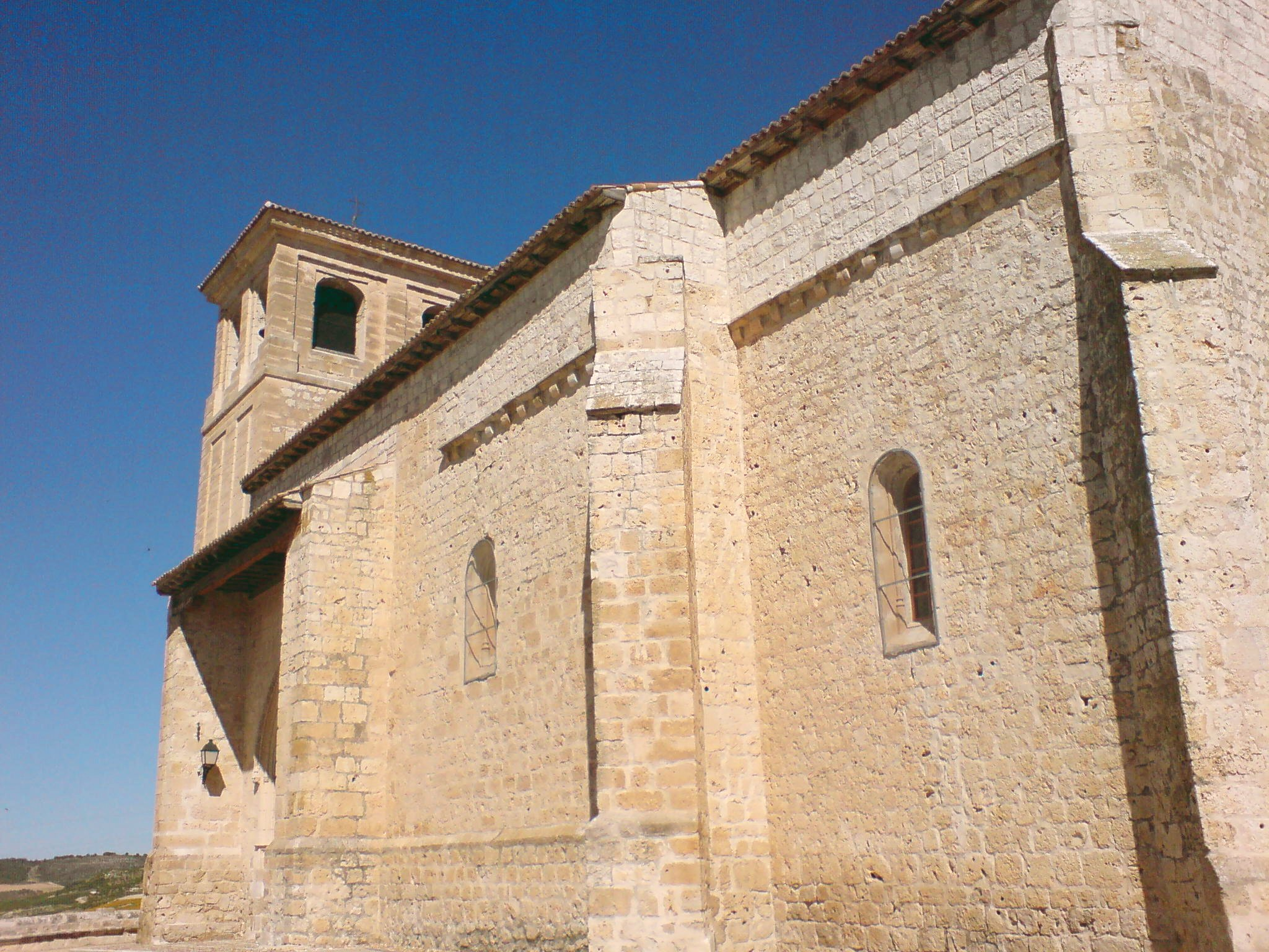 Iglesia de San Pelayo (Olivares de Duero)